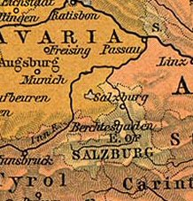 Oude kaart Keurvorstendom Salzburg